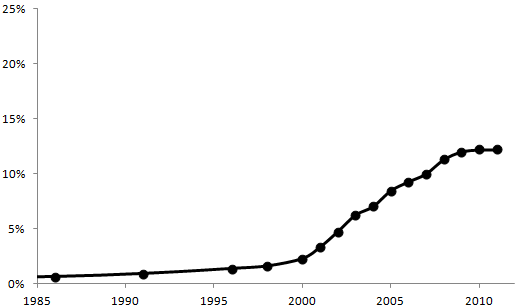 Evolución del porcentaje de población extranjera (1986-2011)